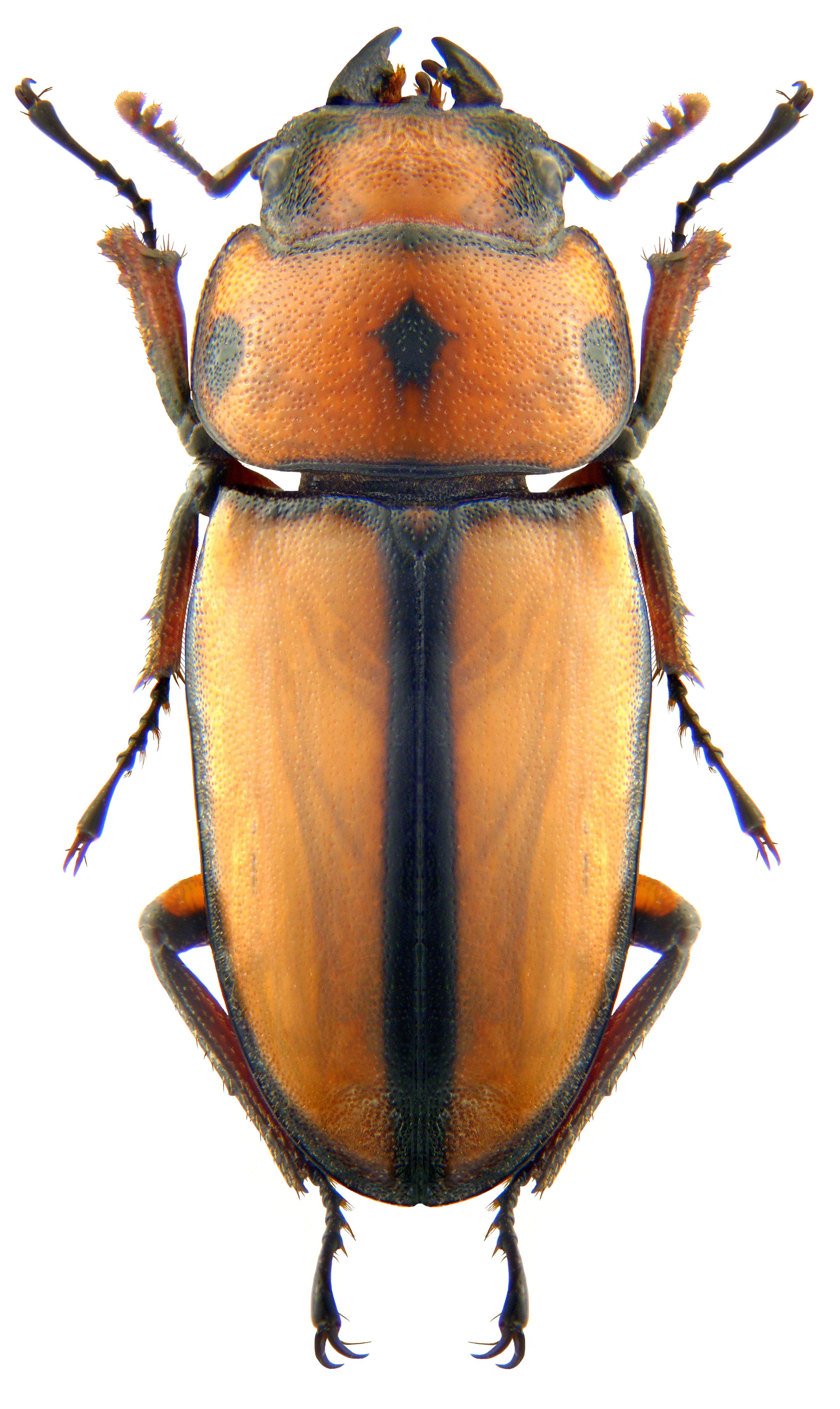 Familie: Lucanidae Groesse: 19,5 mm Fundort: Indonesien, Nord-Sulawesi, Airmadidi leg. det. A.Skale, 2009 Photo: U.Schmidt, 2009